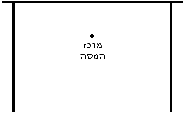 המחשת מרכז מסה Contents 1 רישיון 2 Licensing 3 Original upload log 4 Original upload log רישיון נוצר על ידי משתמש:Adiel lo